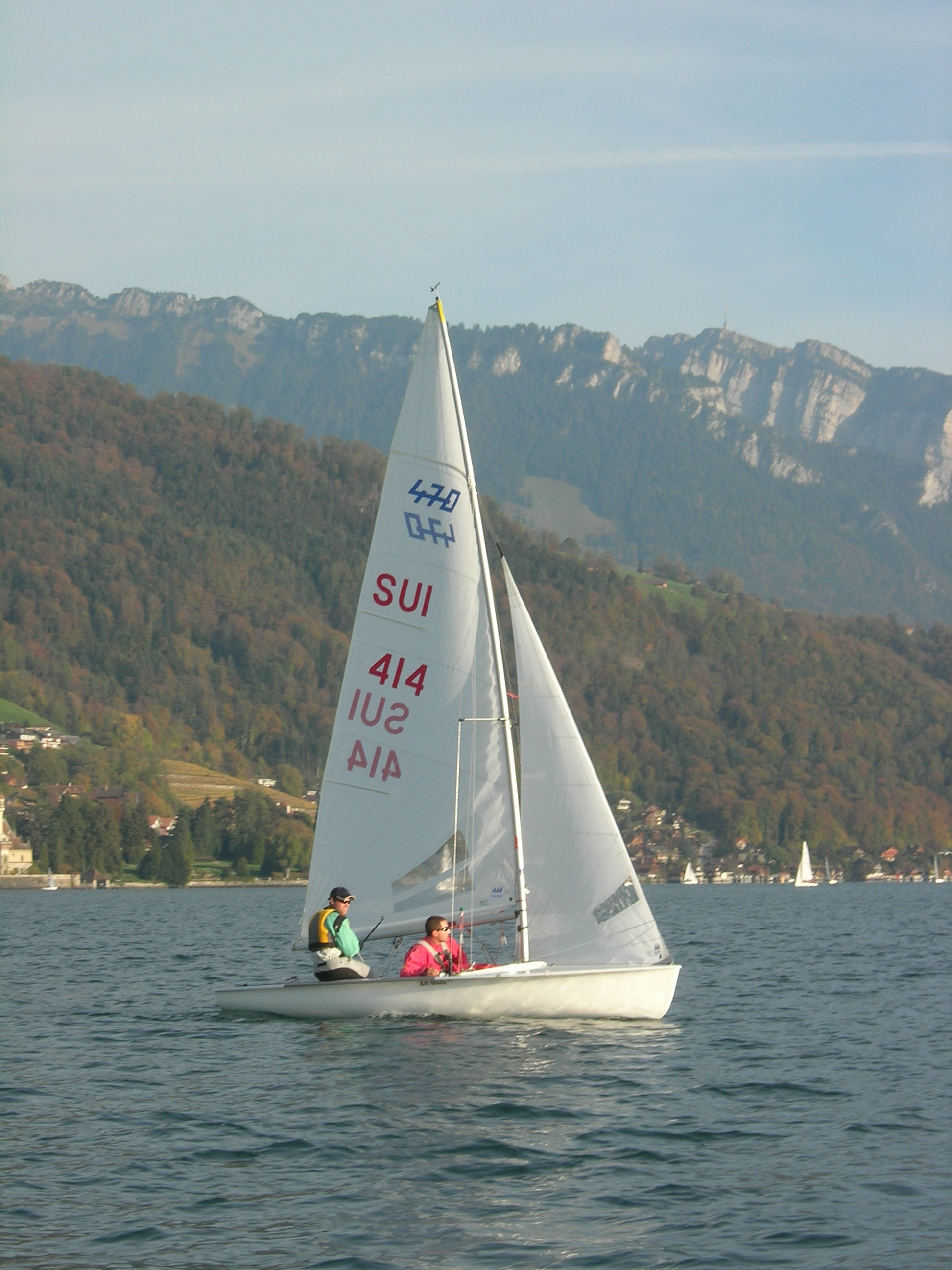 Gemütlicher 470er